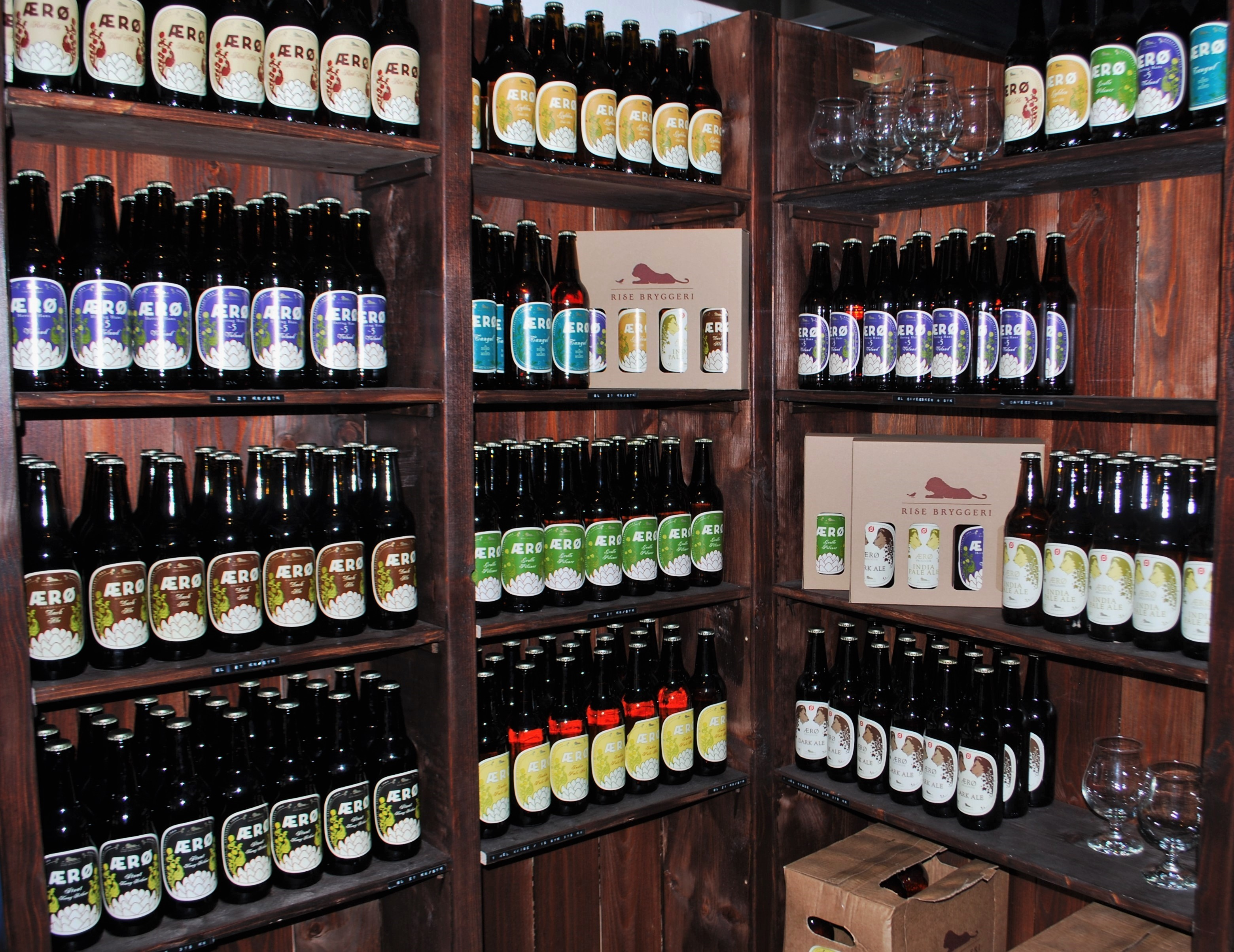 Rise Bryggeris øl